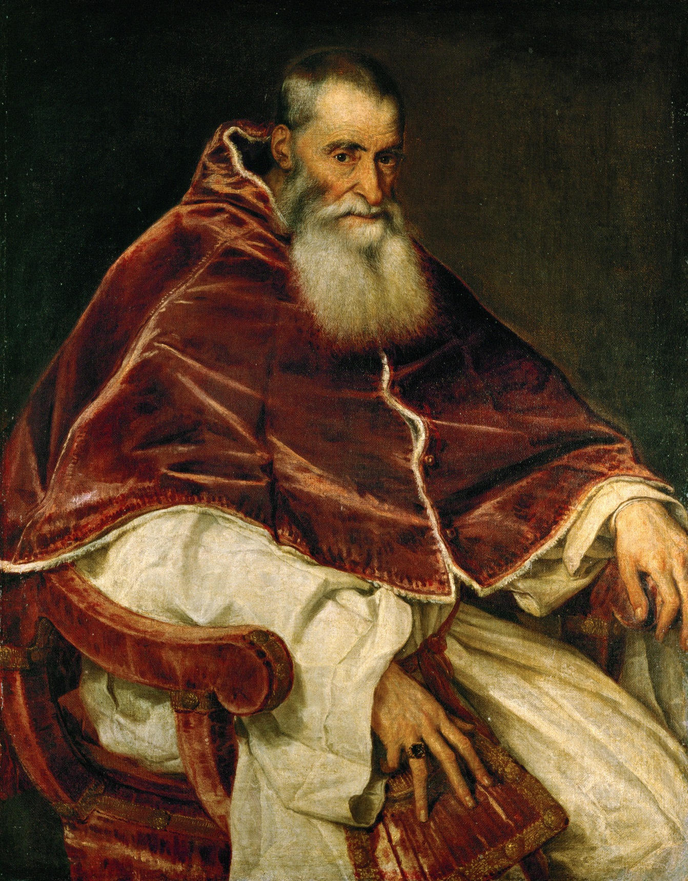 Ritratto di papa Paolo III a capo scoperto.